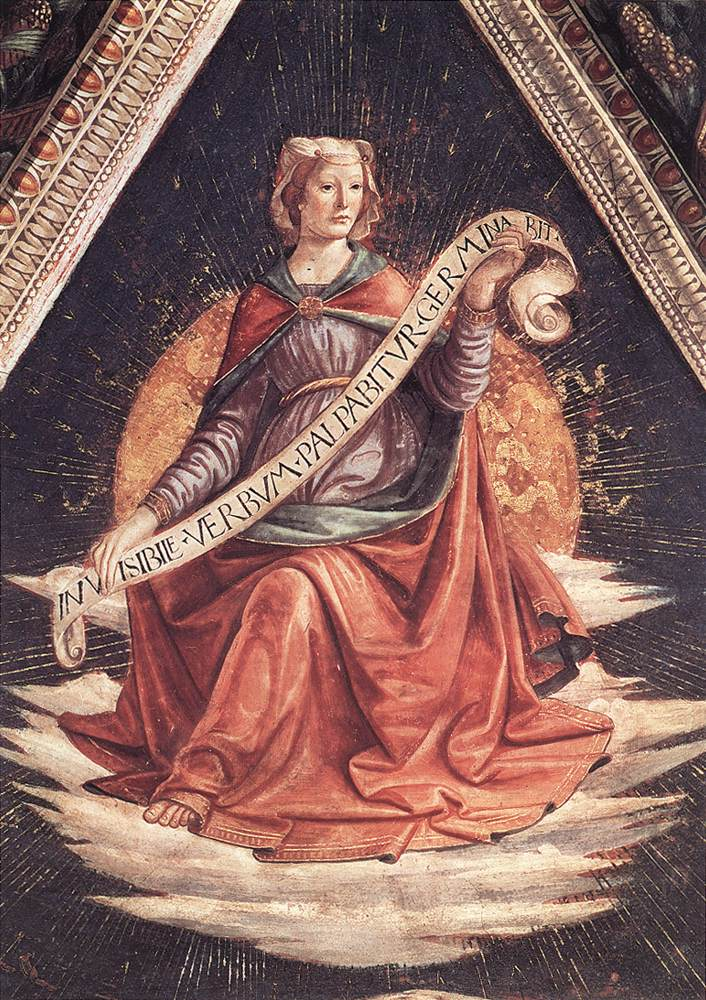 Sibyl. Fresco/ Santa Trinità, Florence